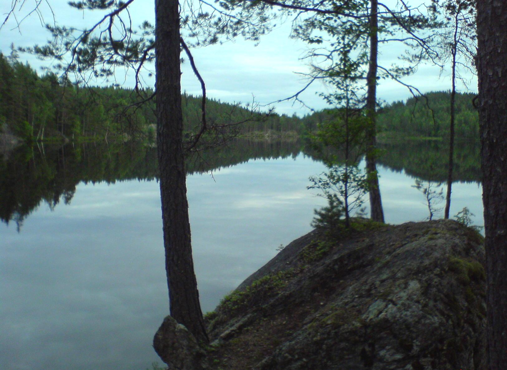 Tasketjern i Aurskog-Høland kommune.